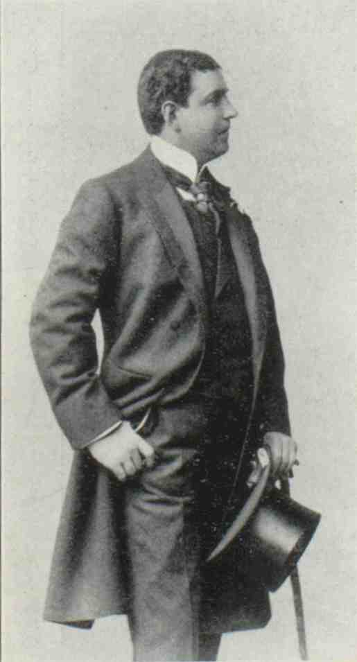 Hugo Jessen, 1908.